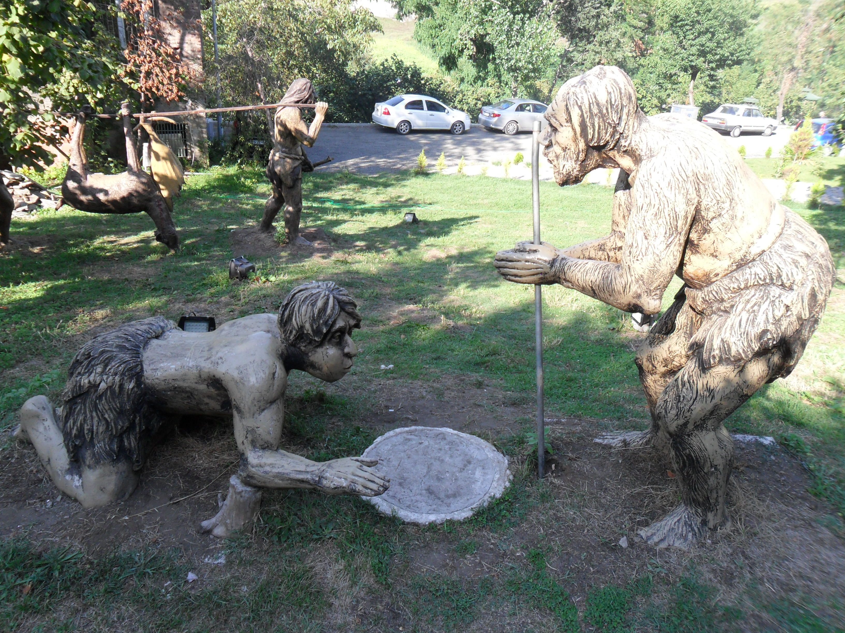 Tekkeköy Mağaraları Arkeoloji Vadisi'nde yer alan Taş Çağı insanlarının ateş yakma anı parodisi.